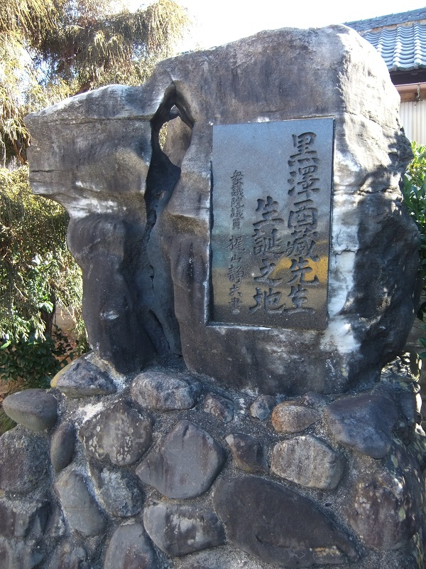 茨城県常陸太田市小目町の黒澤酉蔵の生地跡に建つ酉和館、「黒澤酉蔵先生生誕之地」碑